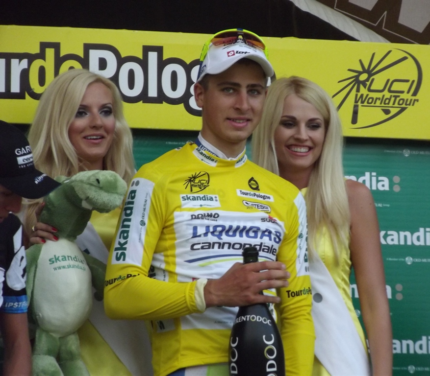 Zdjęcie zrobione podczas ostatniego etapu 68. Tour de Pologne w Krakowie.